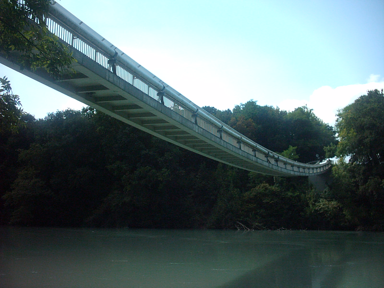 Passerelle du Lignon à Vernier (Suisse)